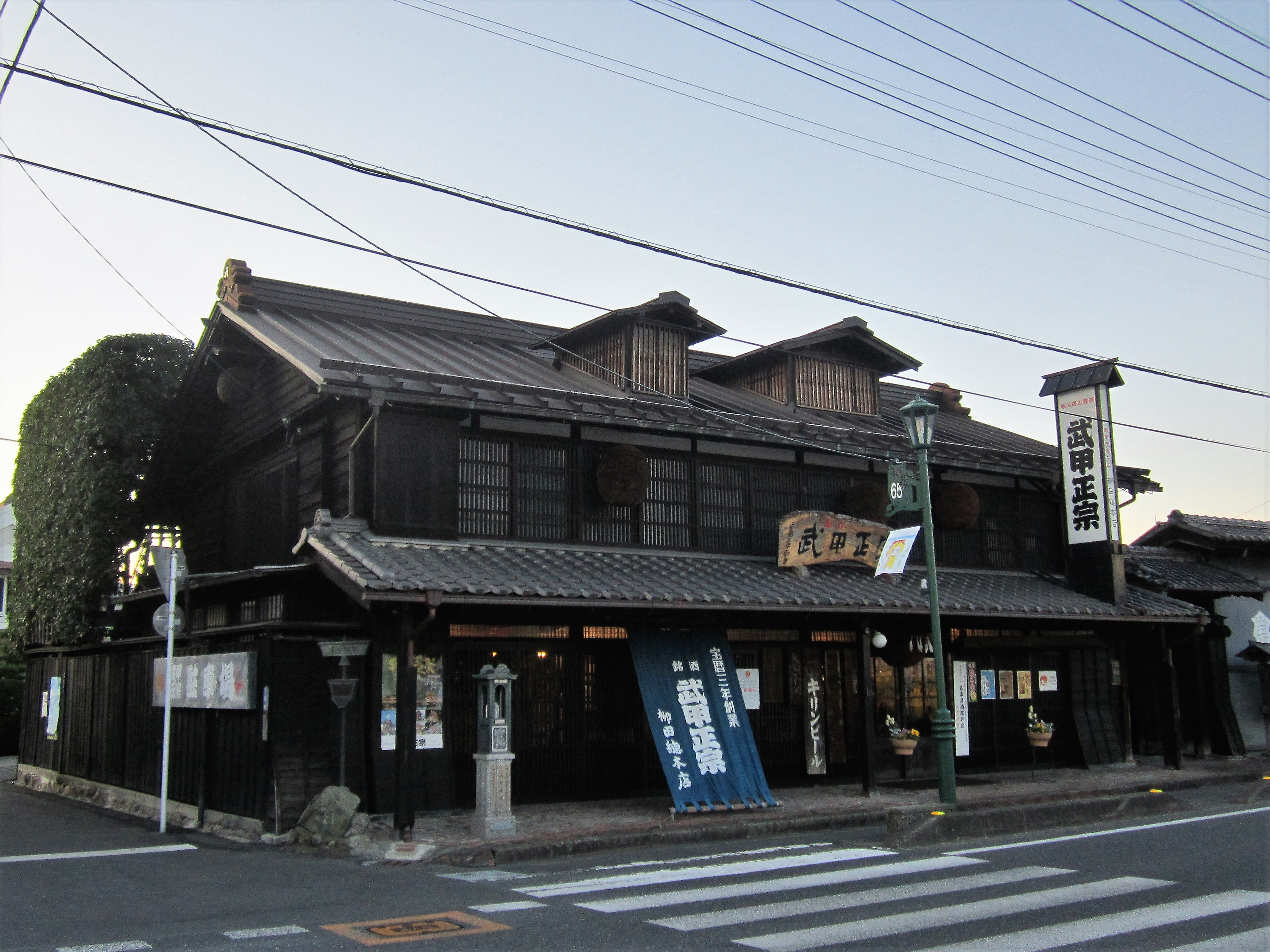 武甲酒造柳田総本店店舗（秩父市宮側町）